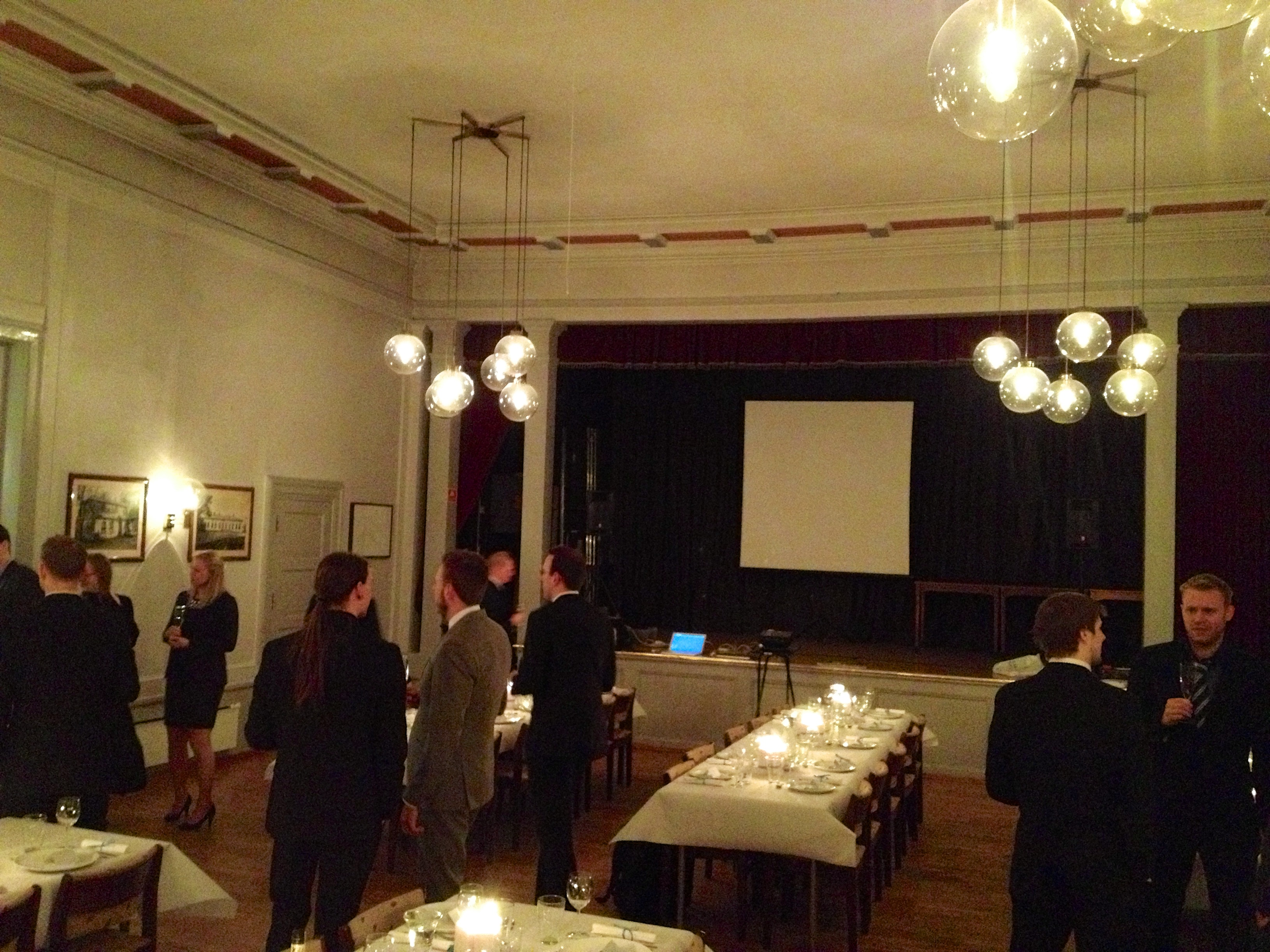 Grefsen og Disen Velhus.